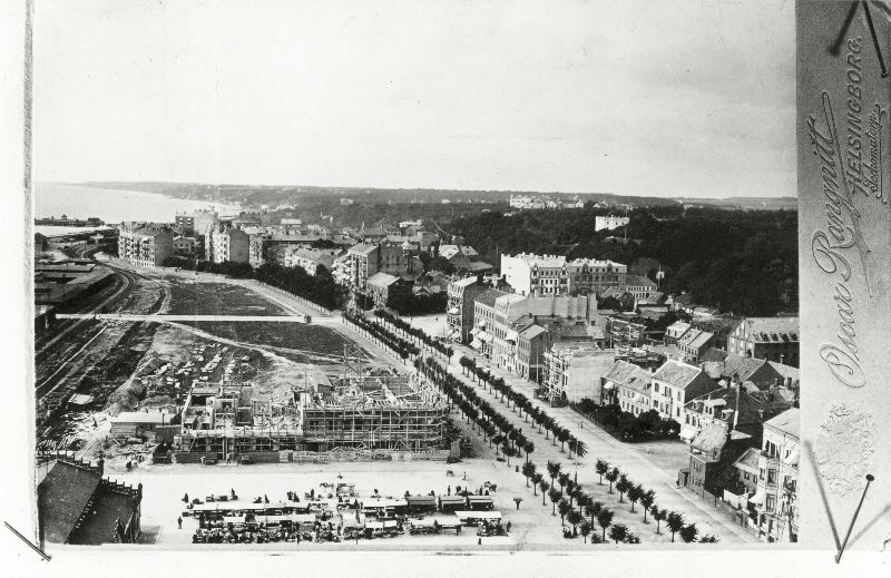 Utsikt från kv. Najaden mot norr. På bilden från 1902 är fastigheterna, Oscar II:1 och 2, på kv. Oscar II:s södra sida på väg att uppföras. Torghandel på Sundstorget. Till höger allén på Drottninggatan. I fonden Gröningen och landborgen med bebyggelse. Till vänster lite av spårområdet och norra hamnen.